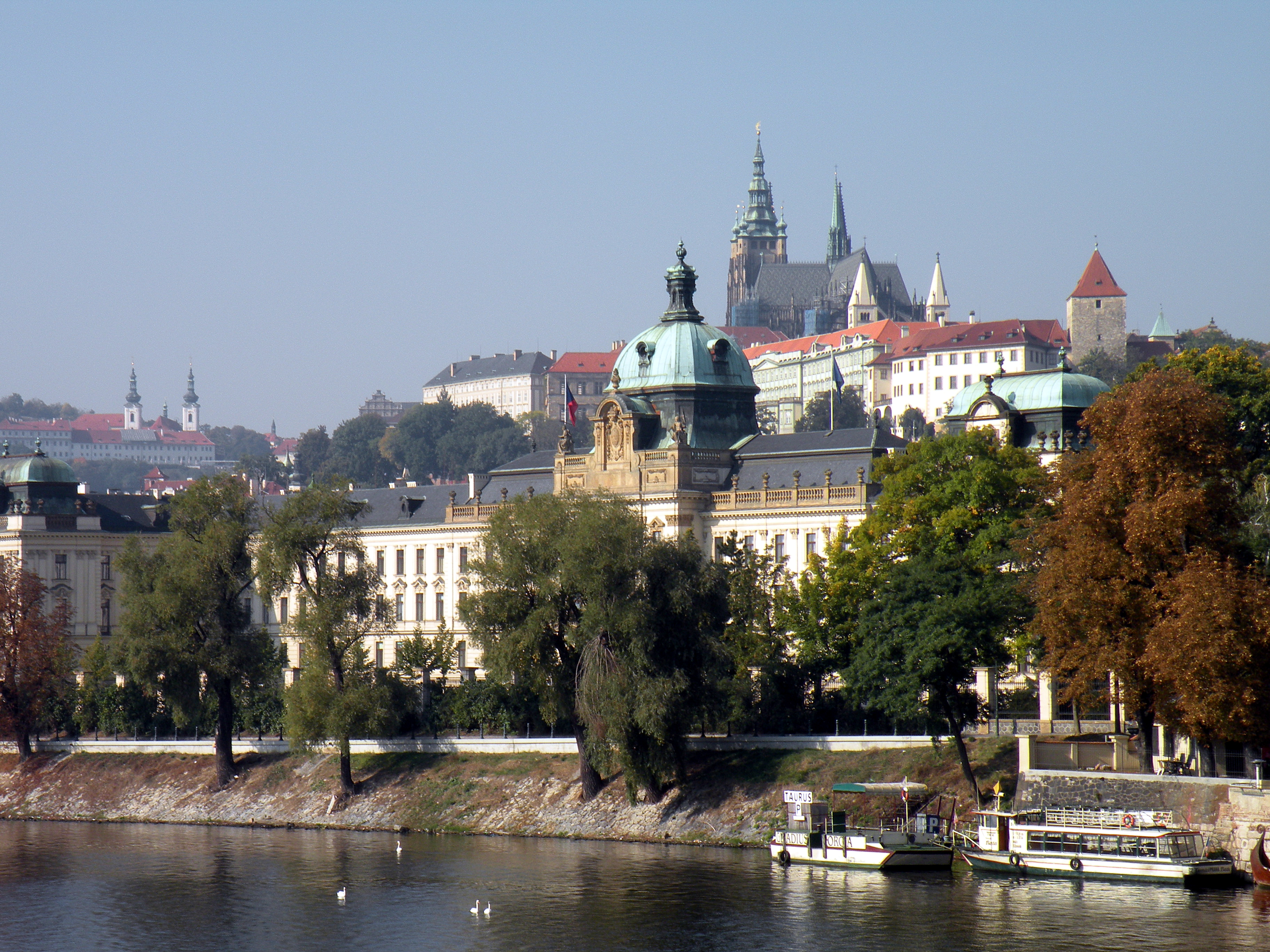 Прага.Вид_на_Старый_город